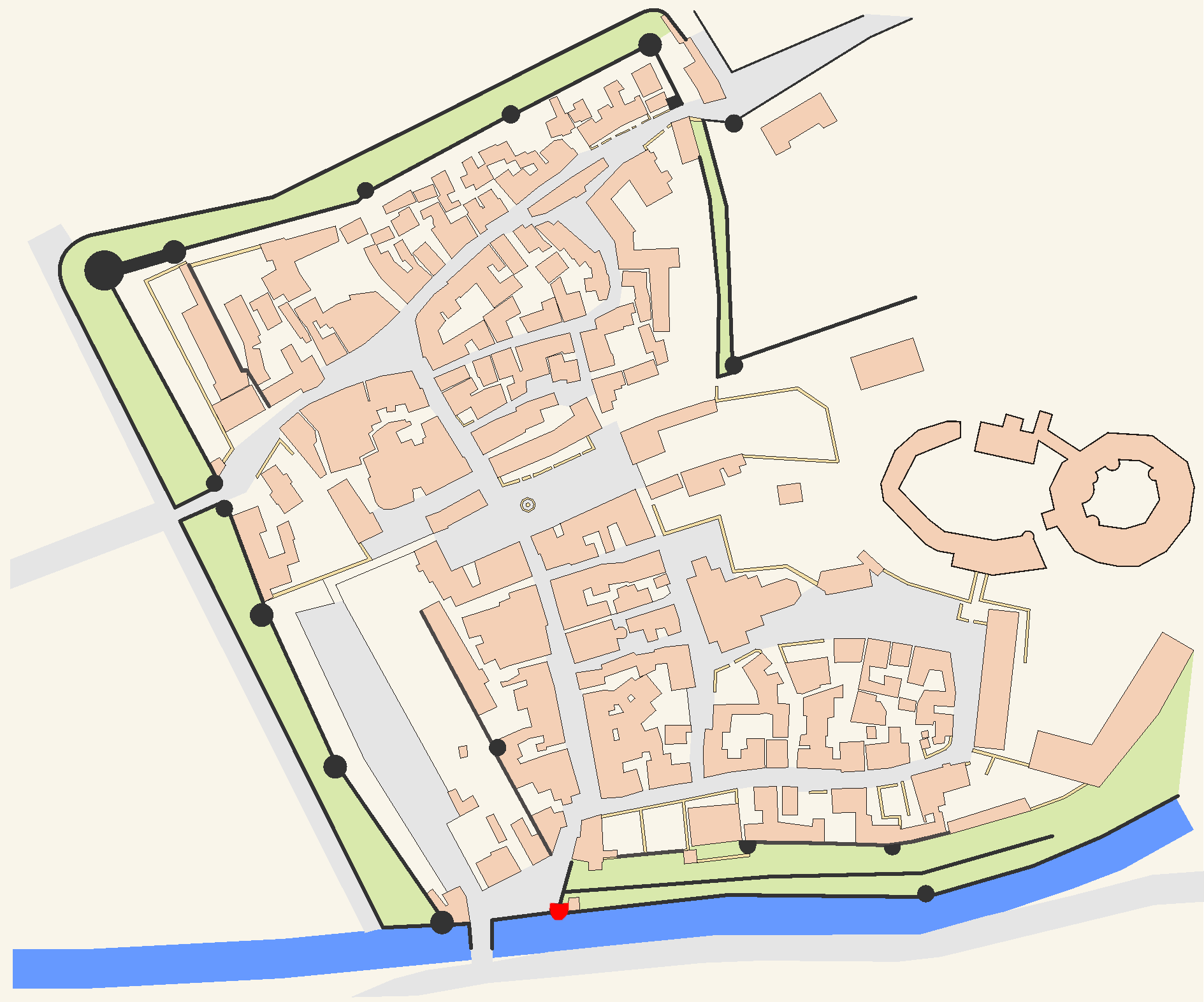 Stadtplan der Büdinger Altstadt - Schlaghaus hervorgehoben; selbst gezeichnet von Steschke, 12. + 13. Januar 2005